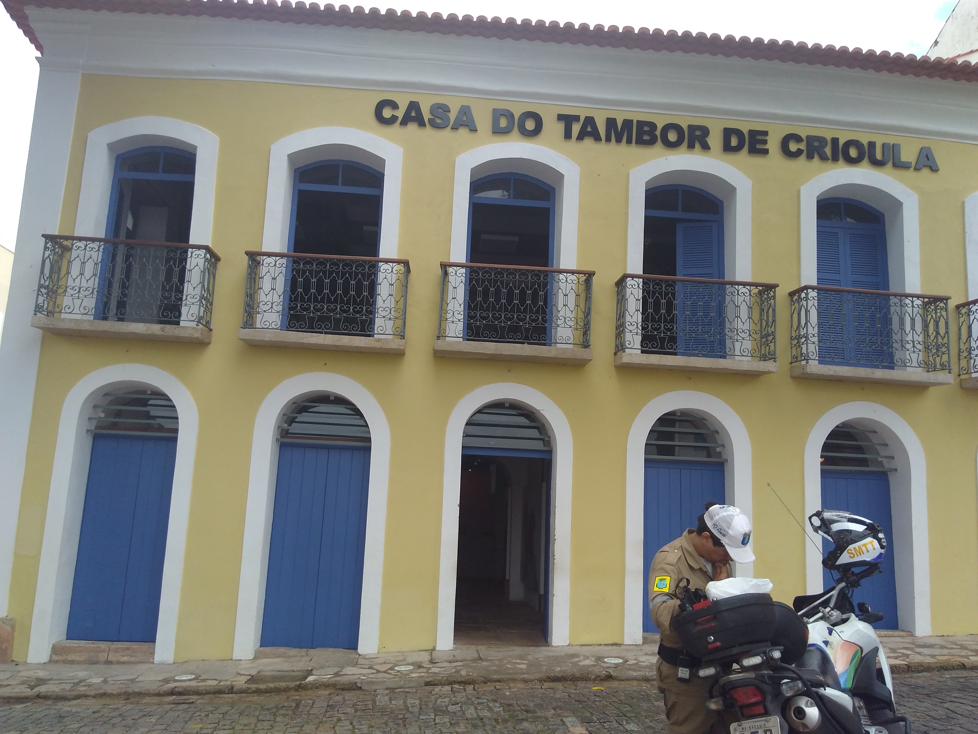 Parte exterior e exposições da Casa do Tambor de Crioula, espaço cultural destinado à preservação memória das manifestações populares de origem afro-brasileiras da cidade São Luís, MA